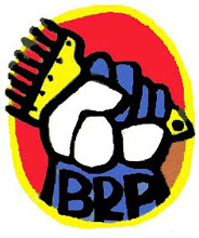 Insignia de la Brigada Ramona Parra